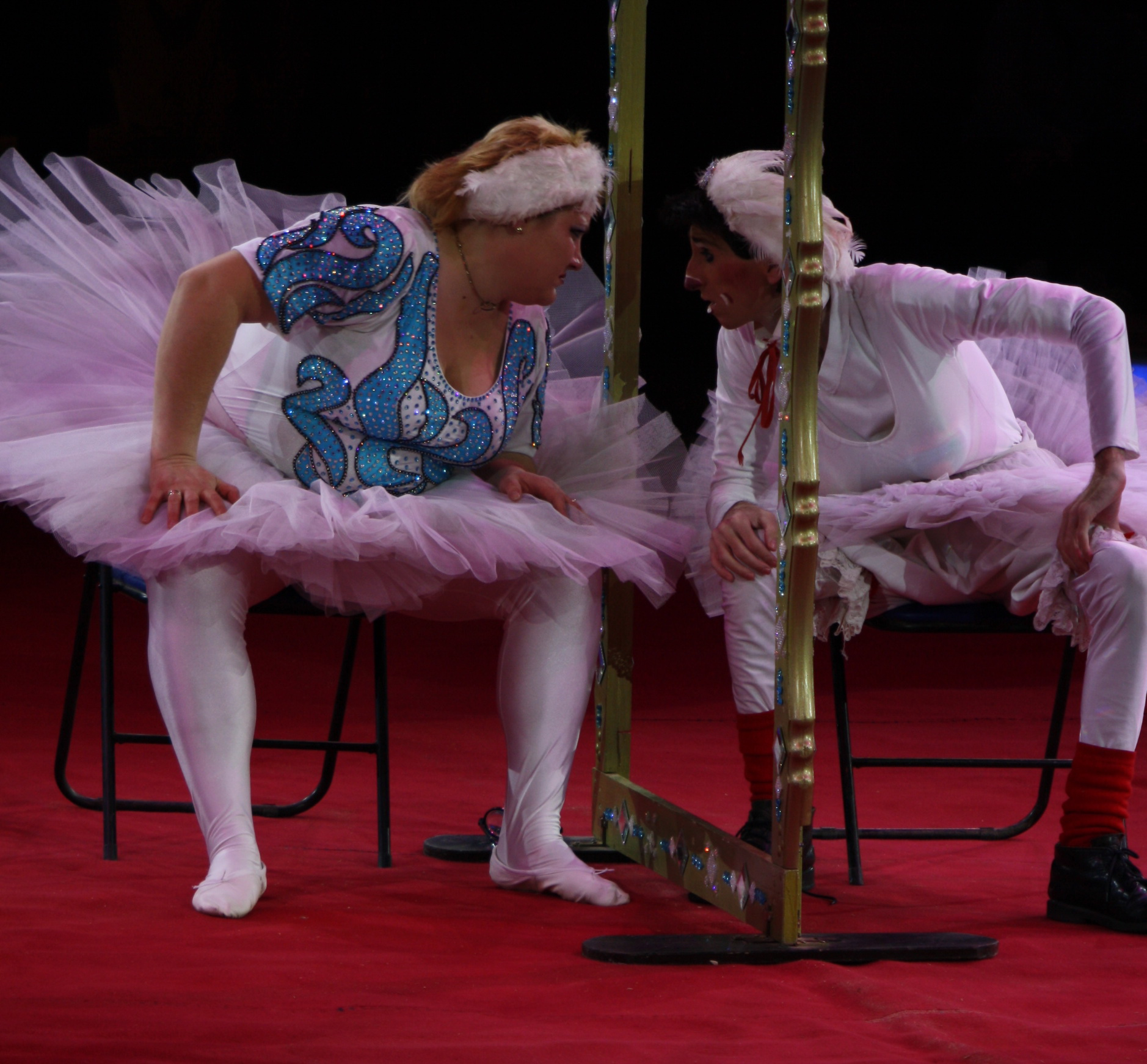 ANGELA & VINCENZO ein Clownduo. Zwei Meister der Situationskomik mit schrillem Humor sorgen für mehr Chaos als Ordnung in der Manege.